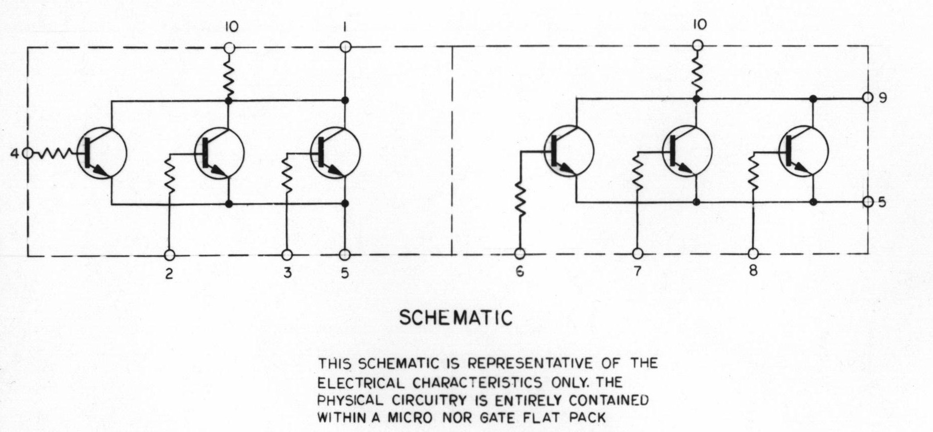 Ausschnitt aus einer NASA-Skizze (AGC) Block-II NOR-Gatter Quelle: NASA (pd)